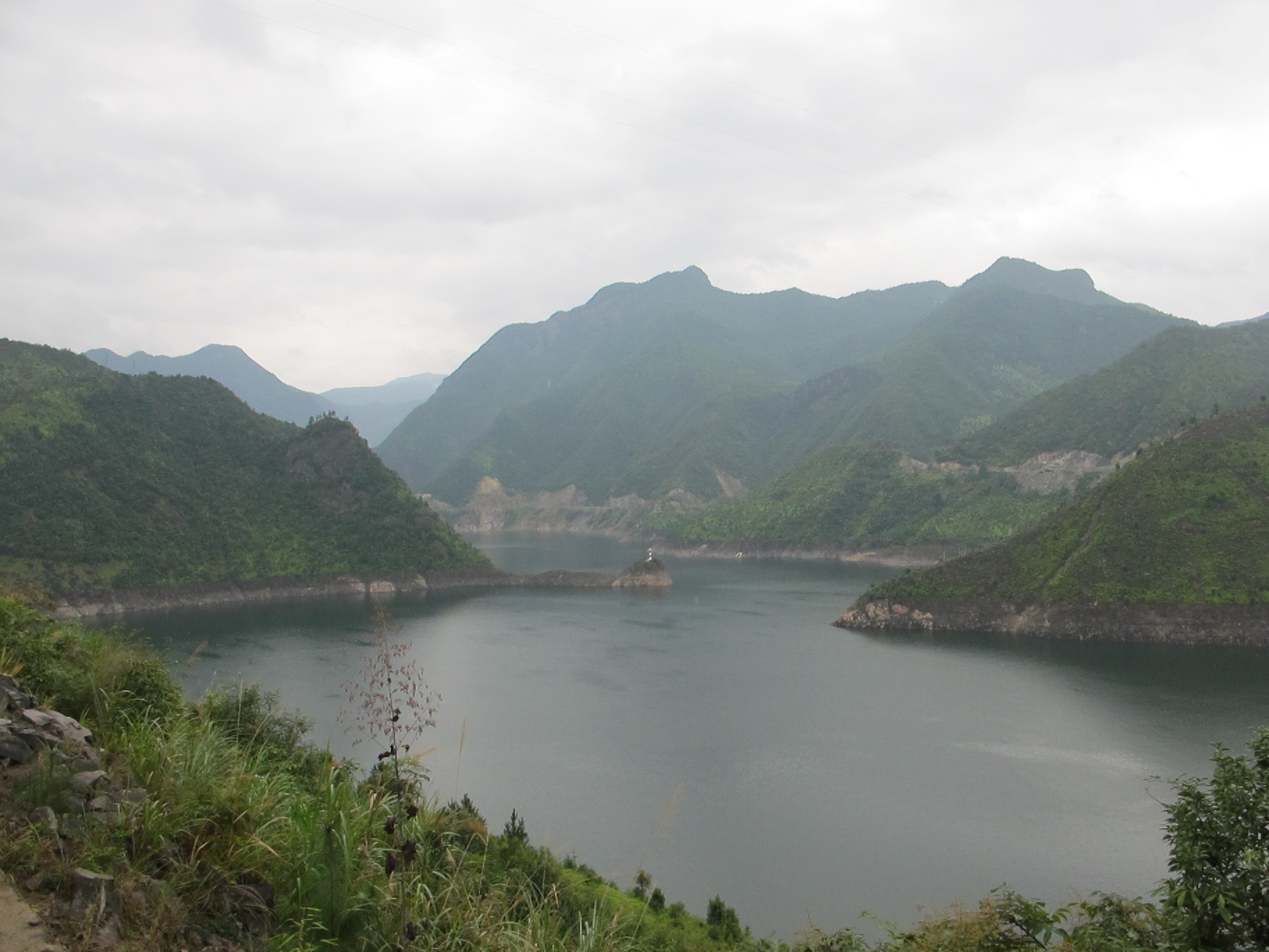 千峡湖风光